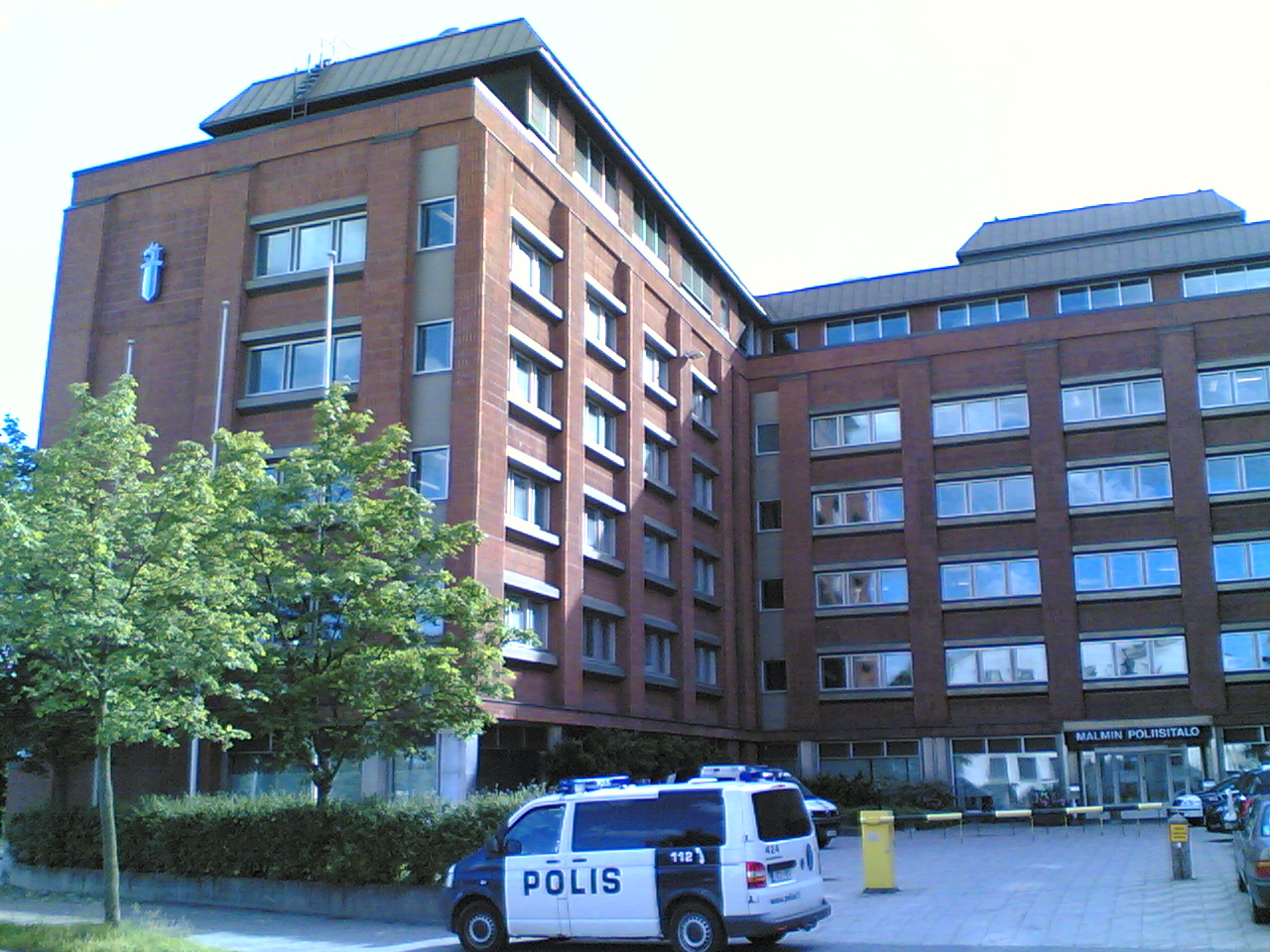 Viljatie